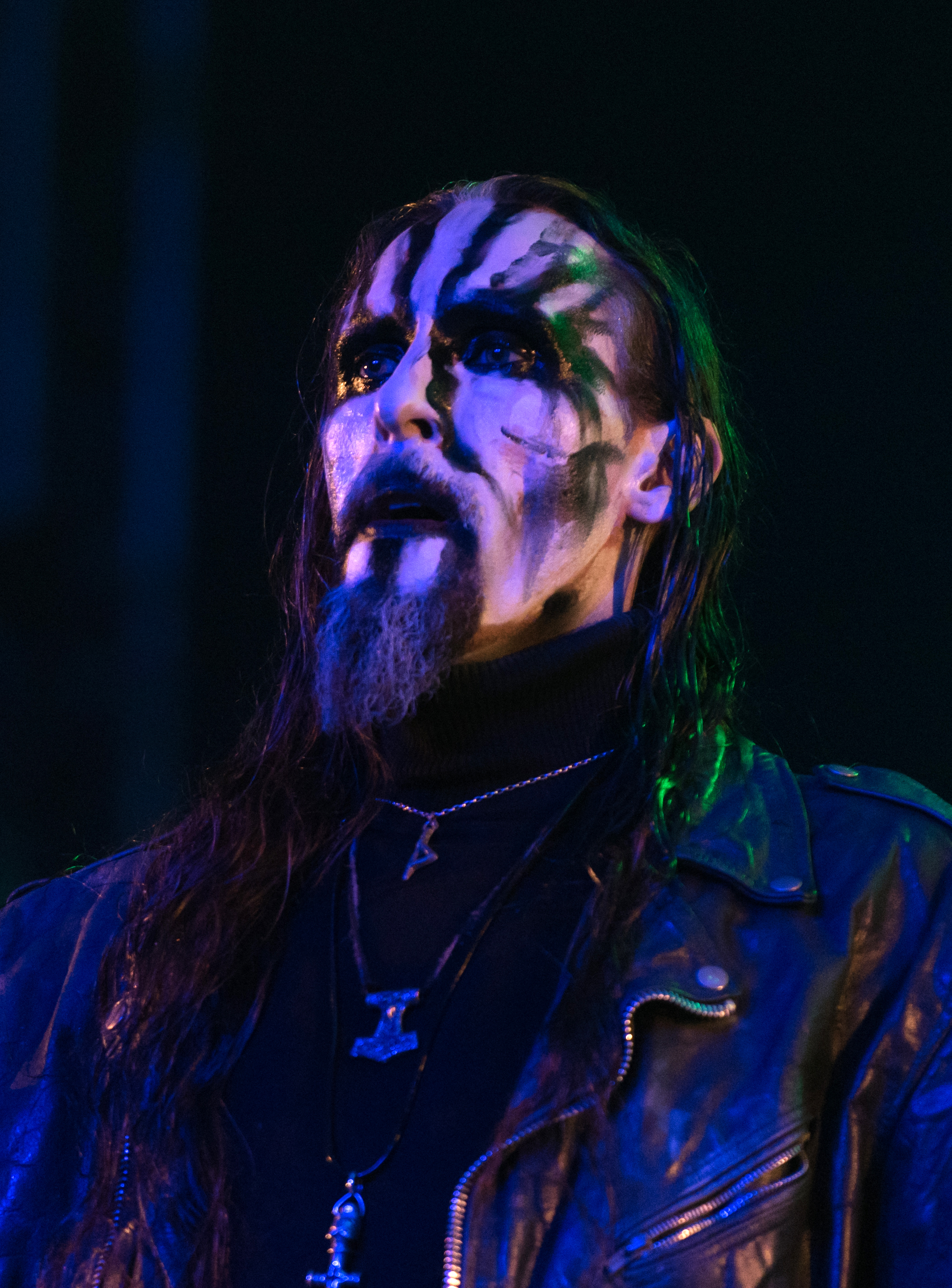 Gaahl's Wyrd beim Wacken Open Air 2018